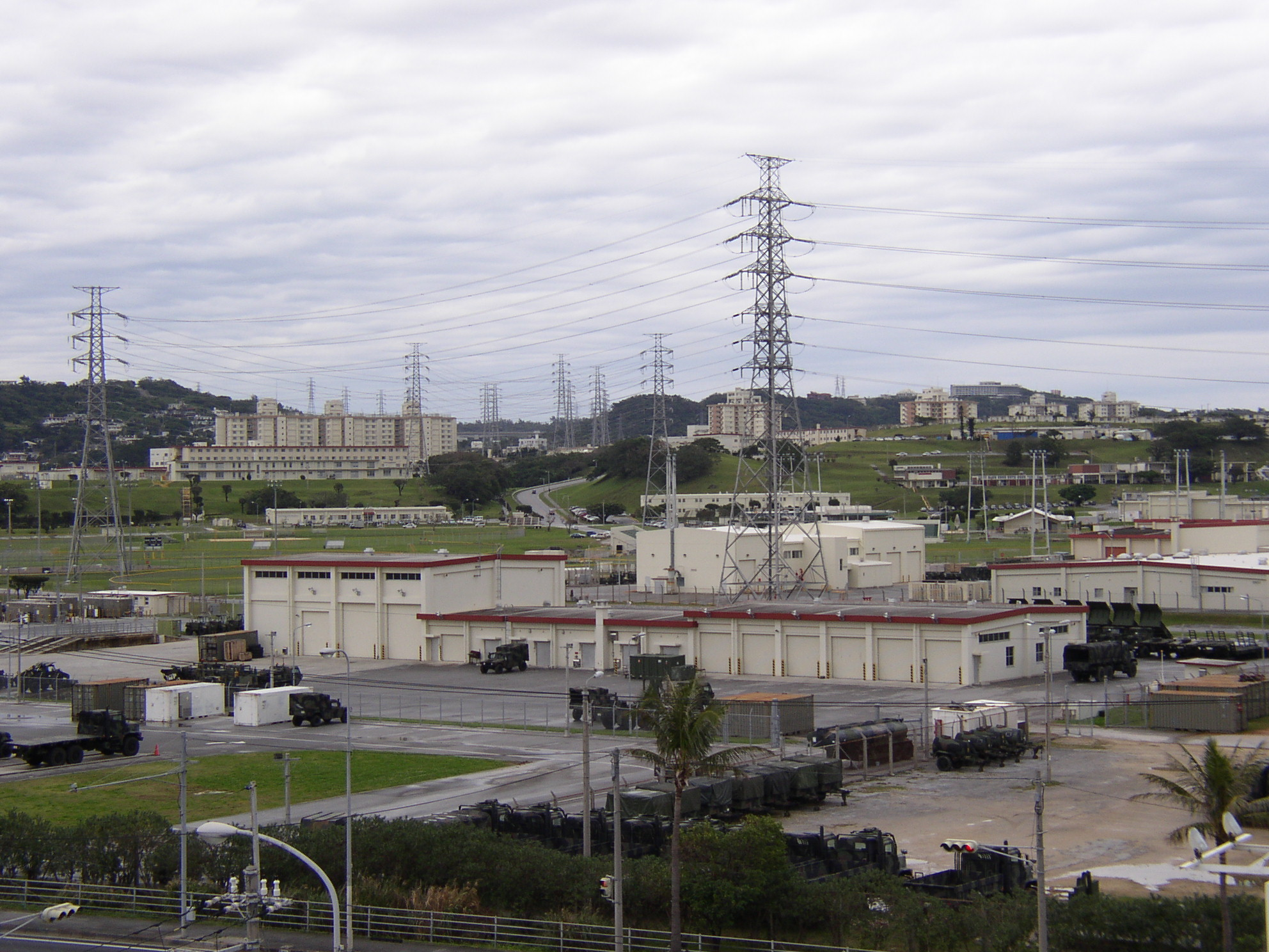 camp foster, okinawa